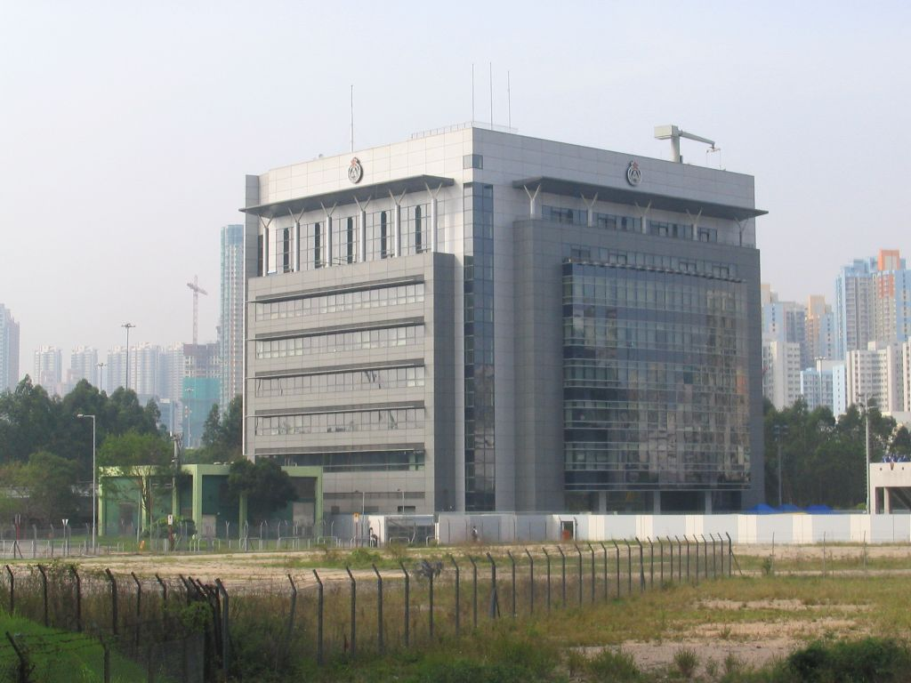 民安隊總部大樓 CAS Headquarter